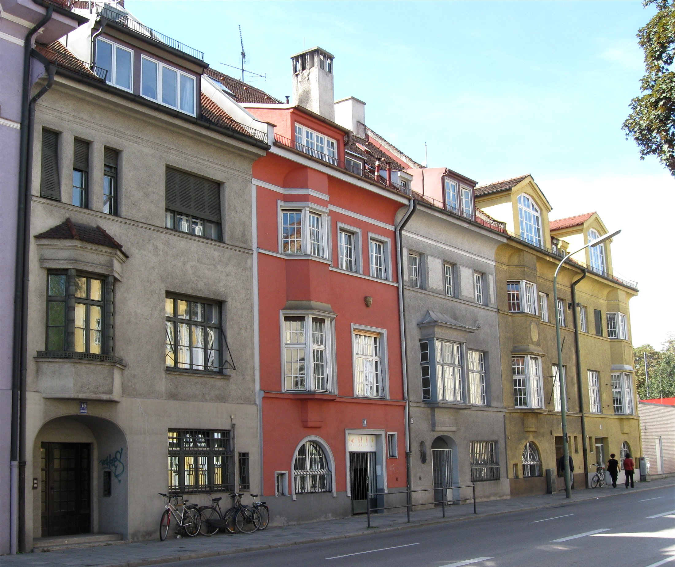 Dietlindenstraße 8, 10, 12, 14, 16; Mietshäuser, historisierend, um 1910